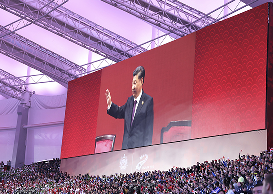 Сборная ВС РФ приняла участие в открытии Всемирных военных игр в Ухане